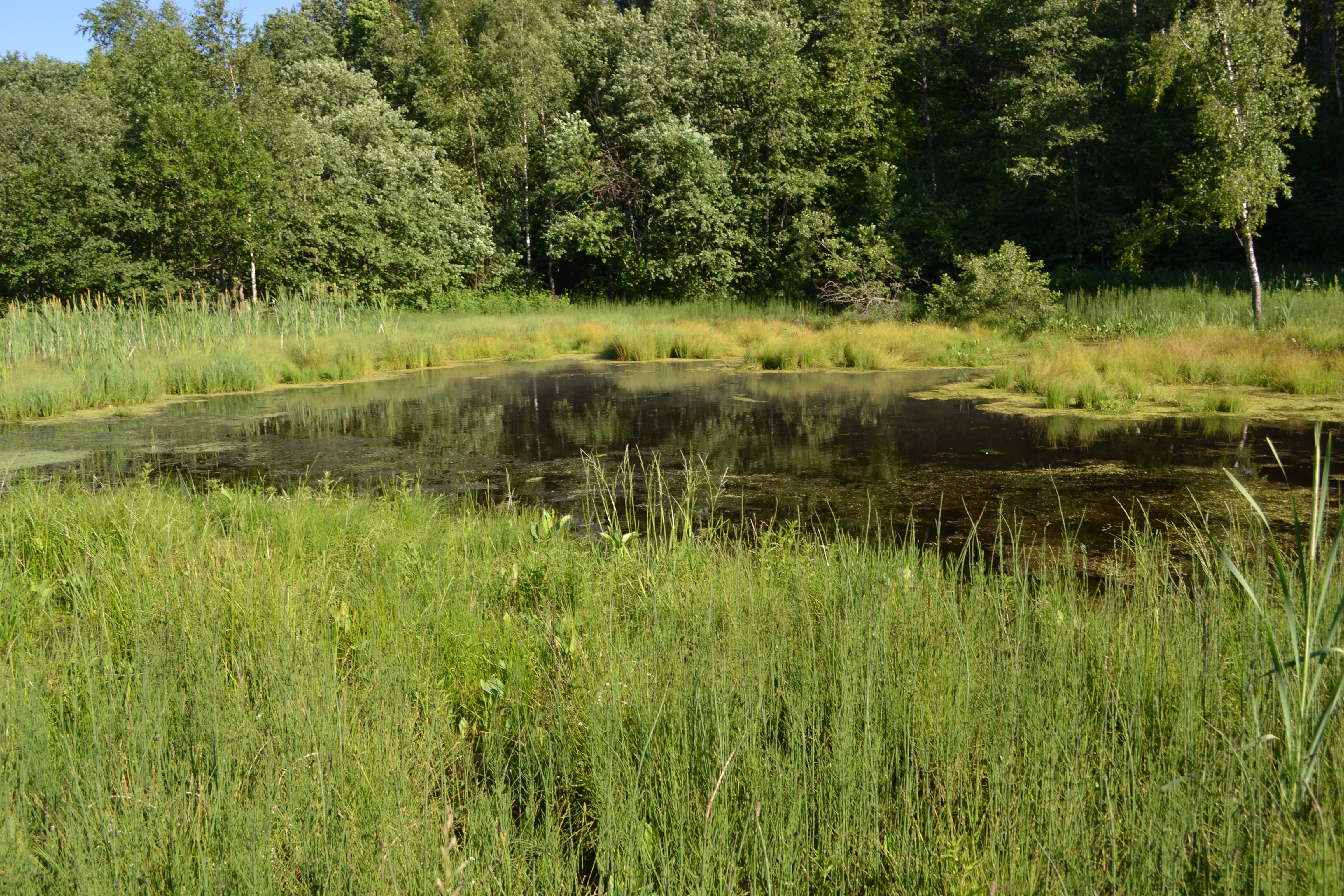 Сергиево-Посадский район, 63 км Ярославского шоссе